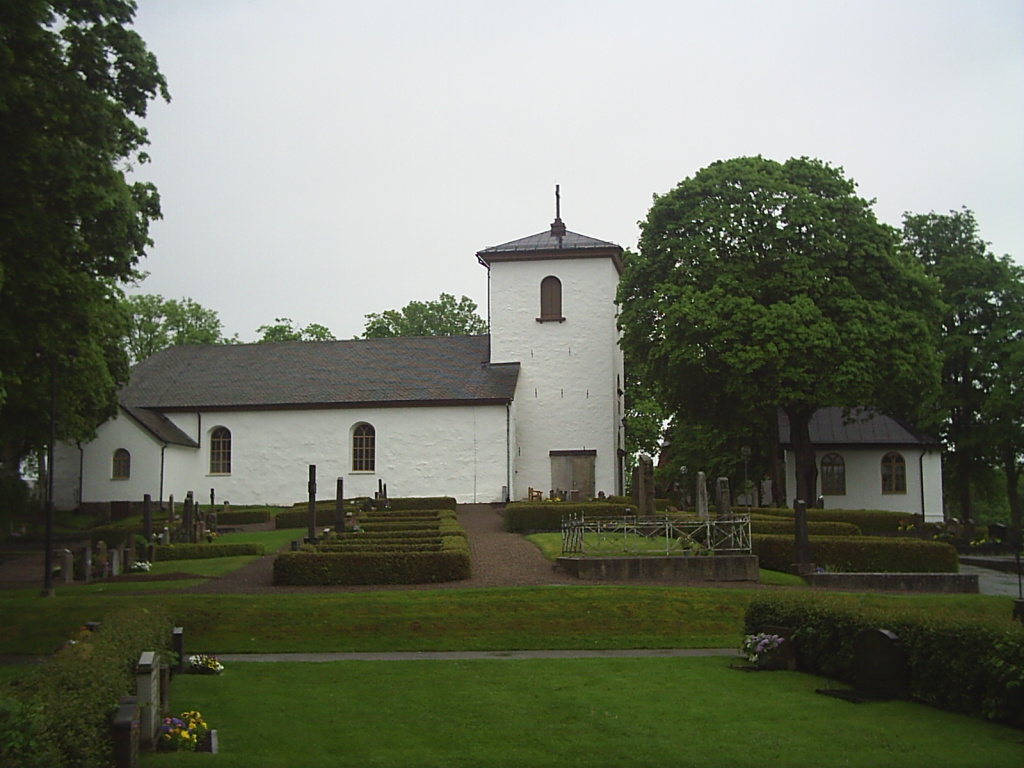 Väne-Åsaka kyrka i Åsaka-Björke församling i Trollhättans kommun. Fotograf: Tubaist